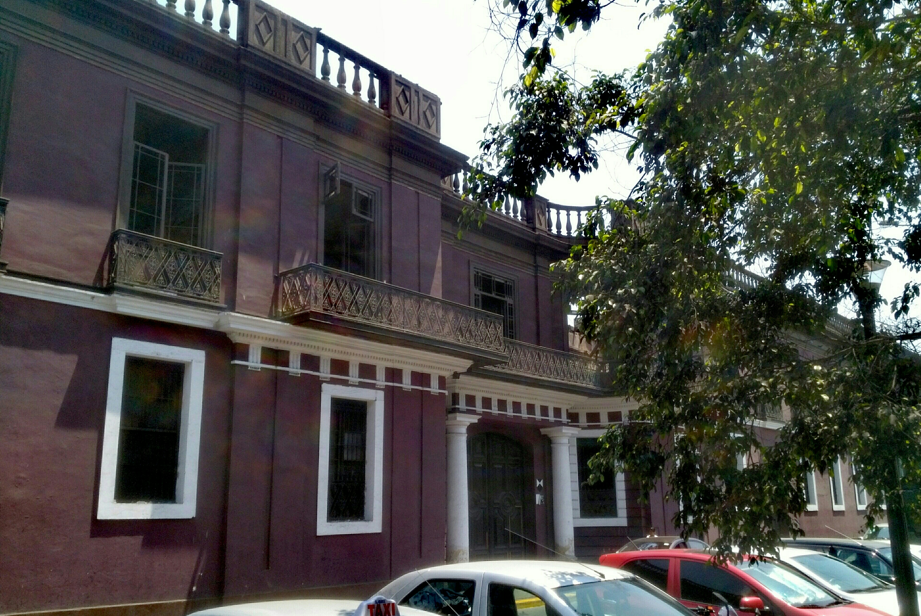 Colegio Real de la Universidad Nacional Mayor de San Marcos, Lima, Peru.